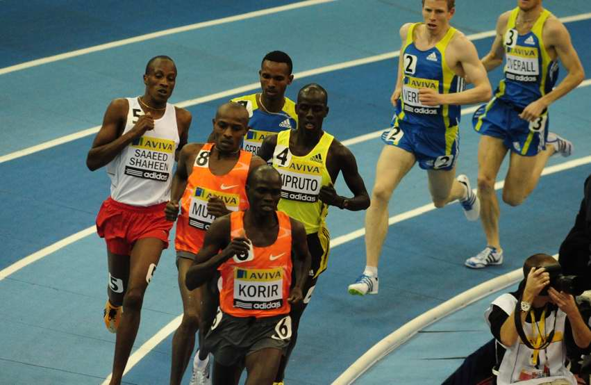 Saif Saaeed Shaheen (QAT), Sammy Mutahi (KEN), Dejen Gebremeskel (ETH), Shedrack Korir (KEN), Brimin Kipruto (KEN) at AVIVA GRAND PRIX - Birmingham